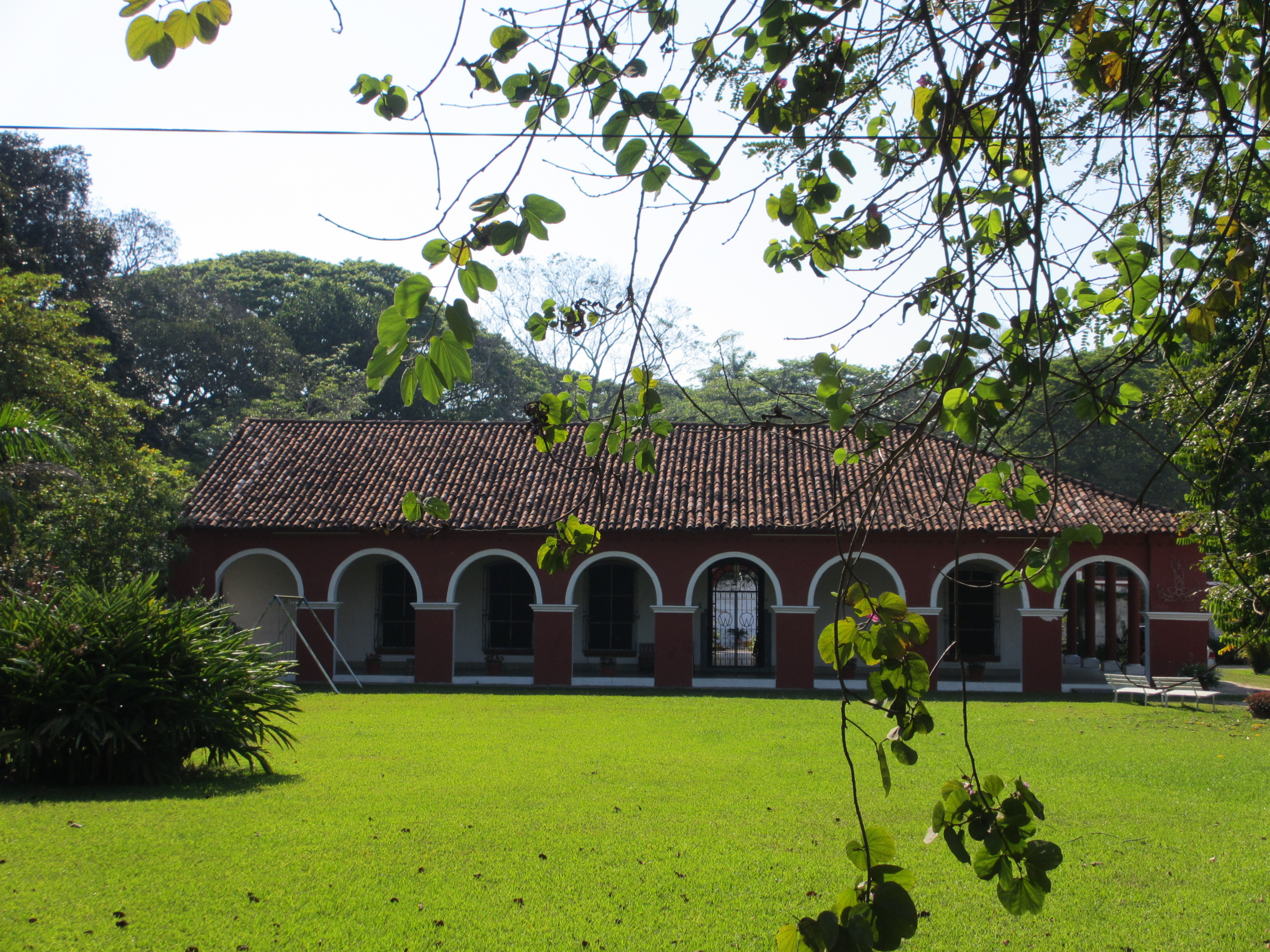 Casco de la Hacienda La Luz. Comalcalco. Tabasco. México.